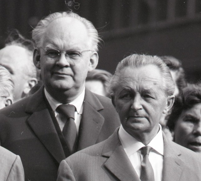 Bildausschnitt mit R. Jäger (l) und B. Hopp (r) aus einem Foto der Besucher bei der Jacobi-Turm-Einweihung 1961.